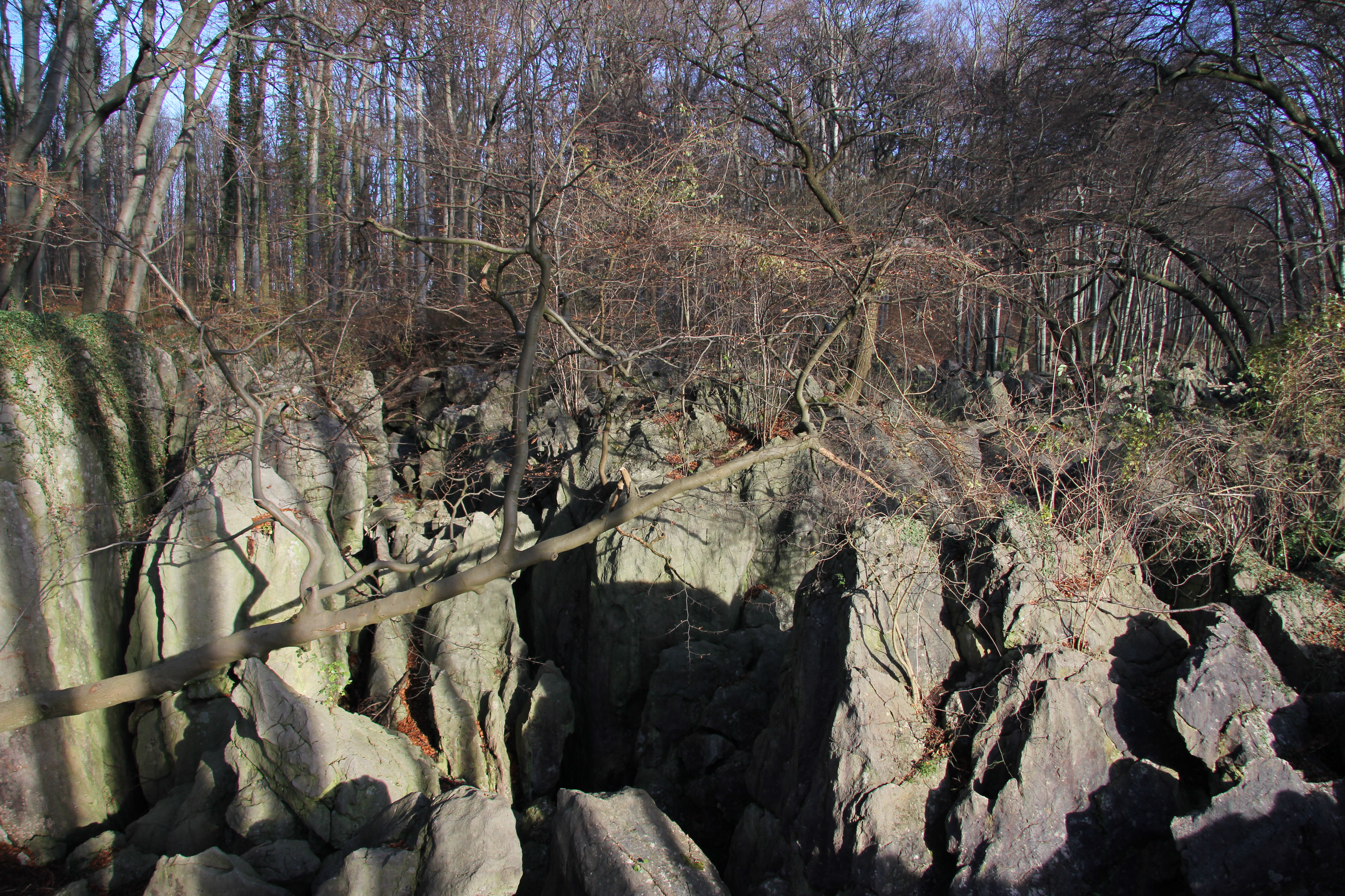 Felsenmeer Hemer, Aufnahmen von 2010